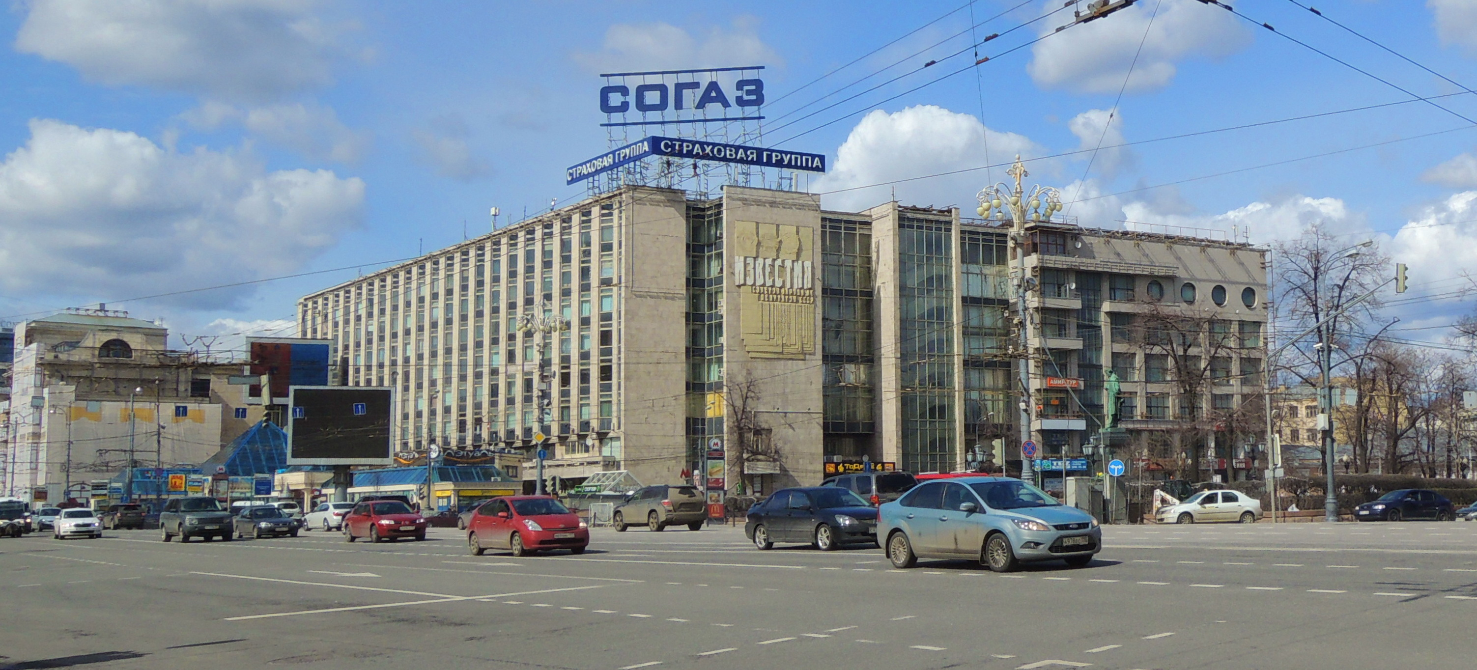 FПушкинская площадь